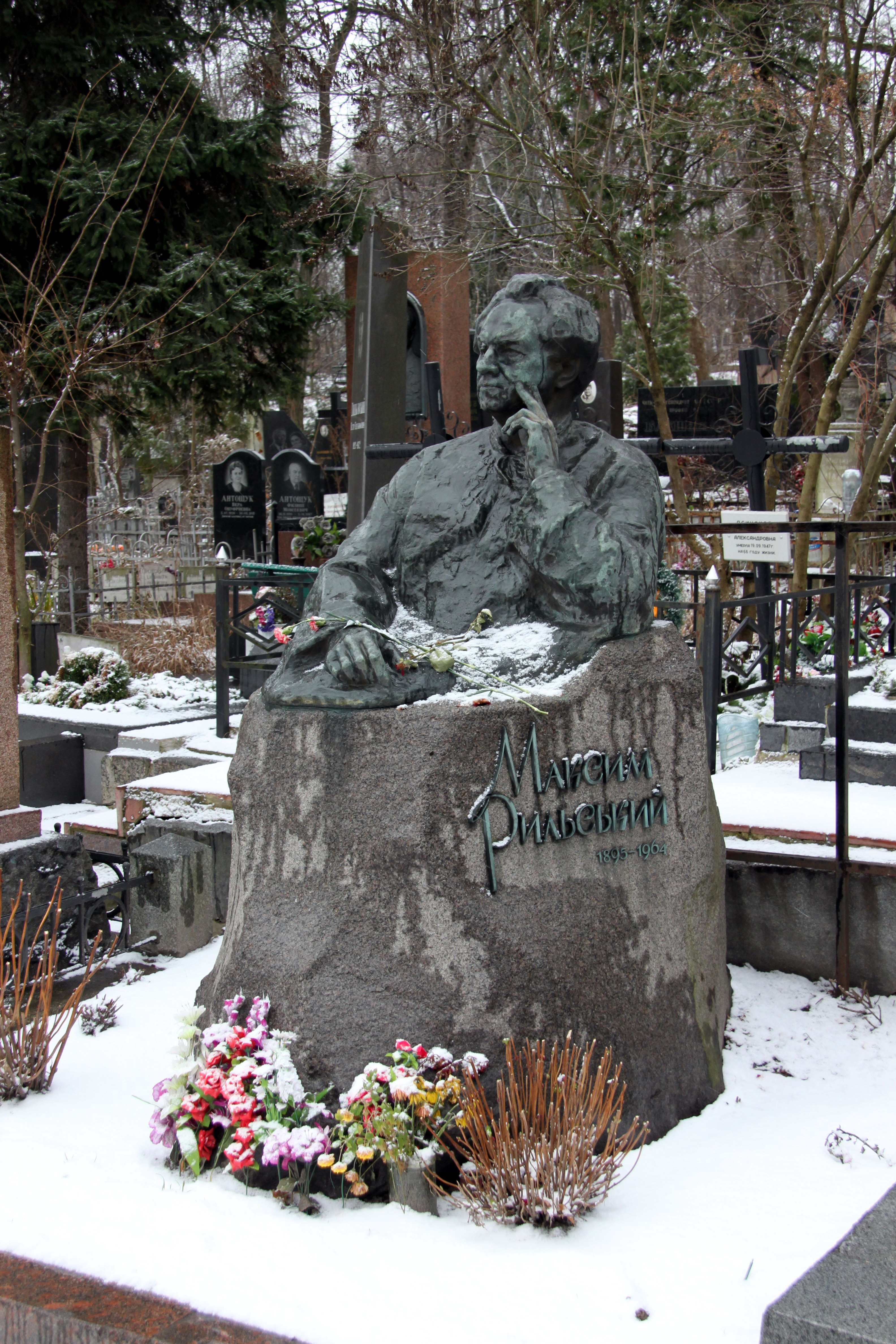 Могила Рильського М. Т., поета, громадського діяча, Байкова вул., 6, Київ